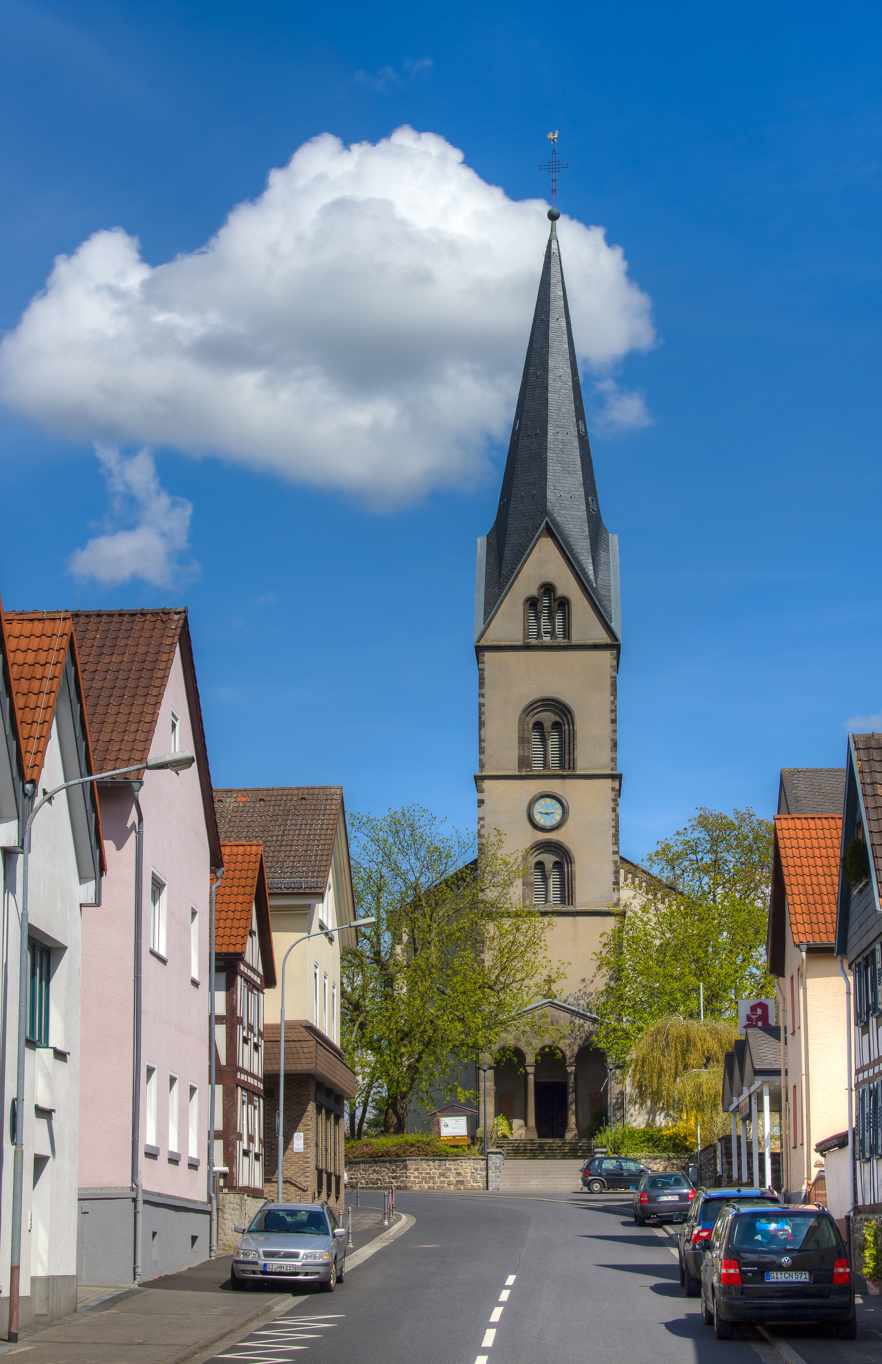 Evangelische Kirche Steinbach, Gemeinde Fernwald, Landkreis Gießen in Hessen, Deutschland